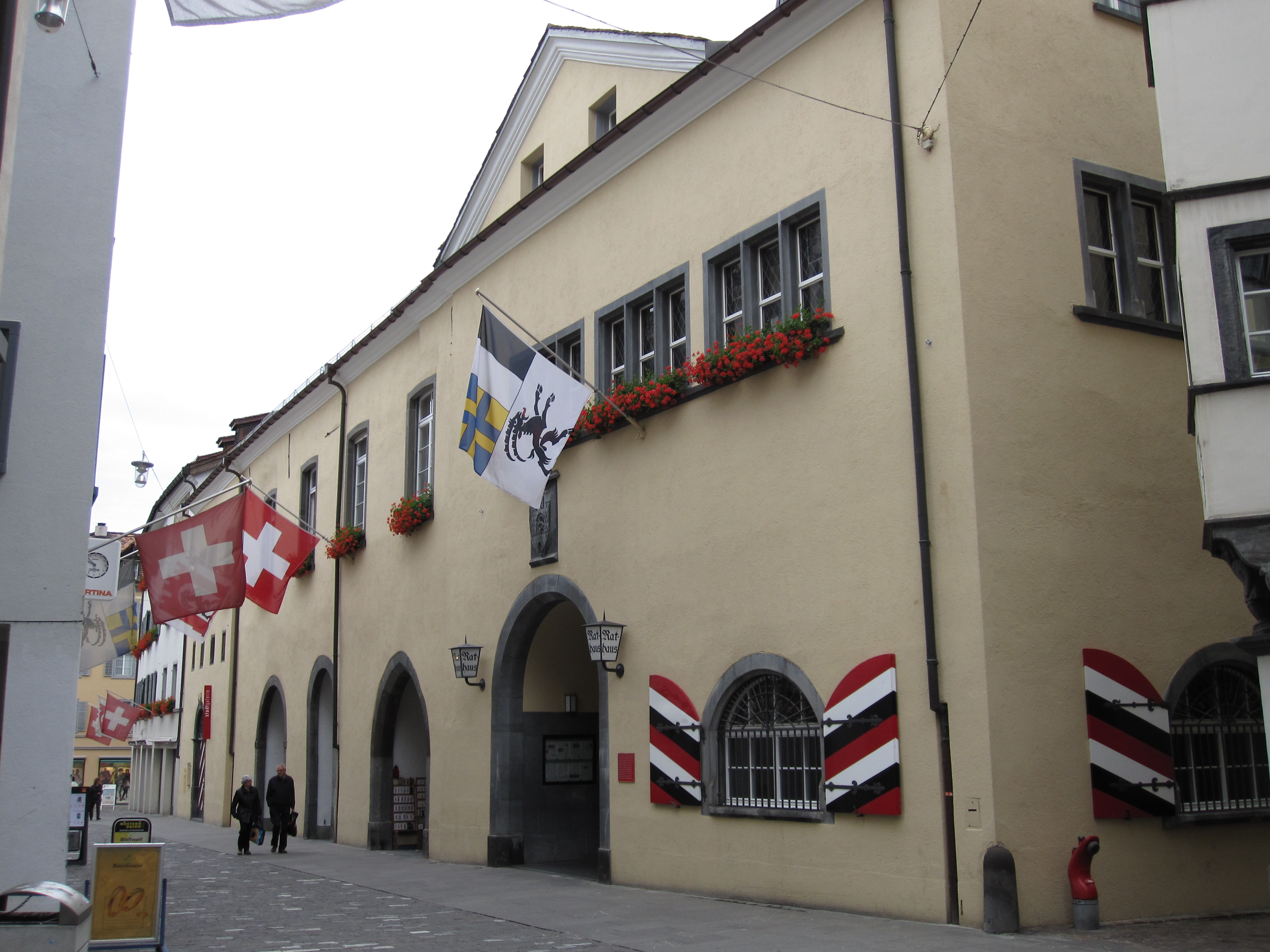 Rathaus in Chur (Kanton Graubünden)